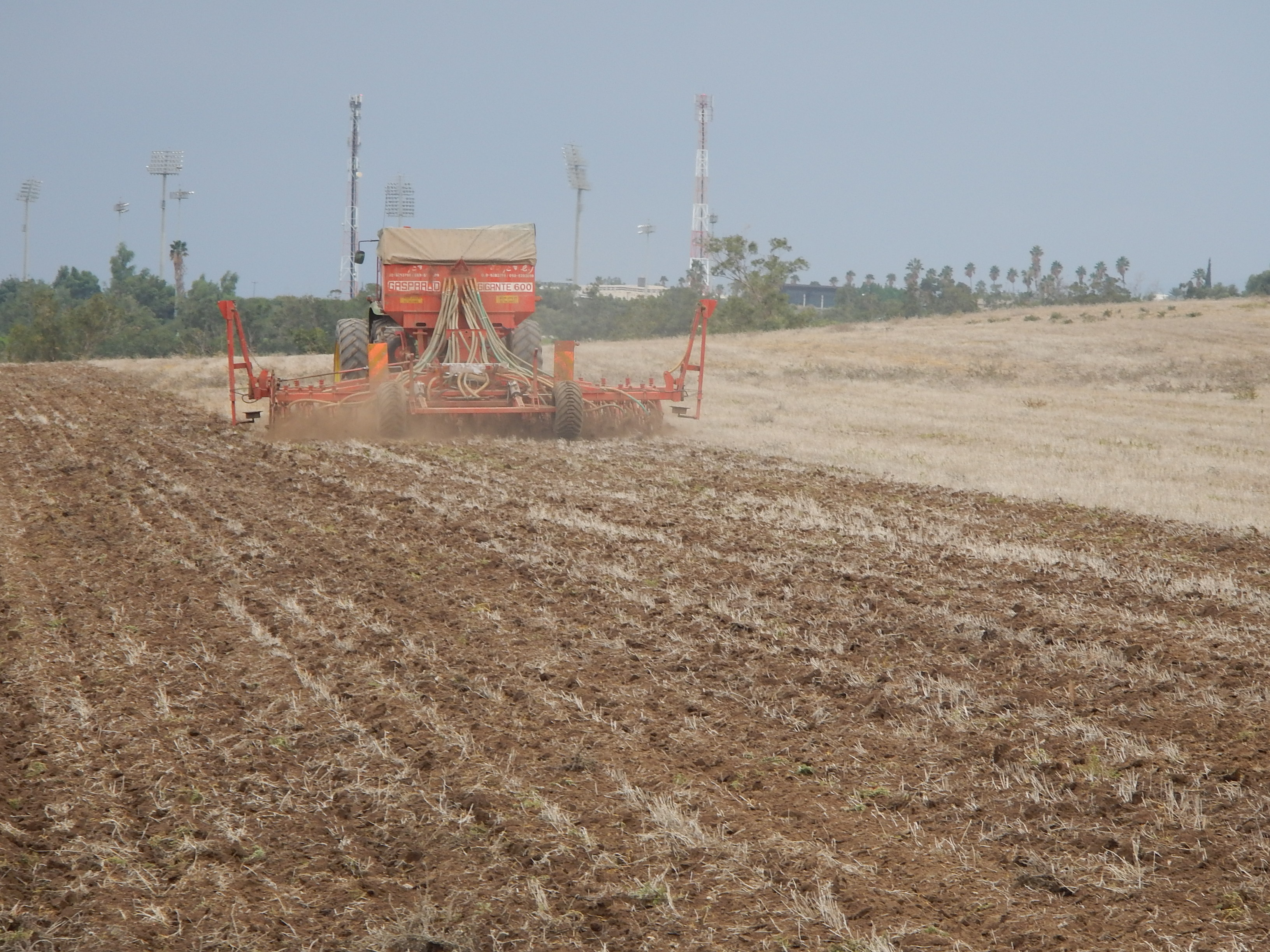 מזרעת אי פליחה לגידולי פלחה